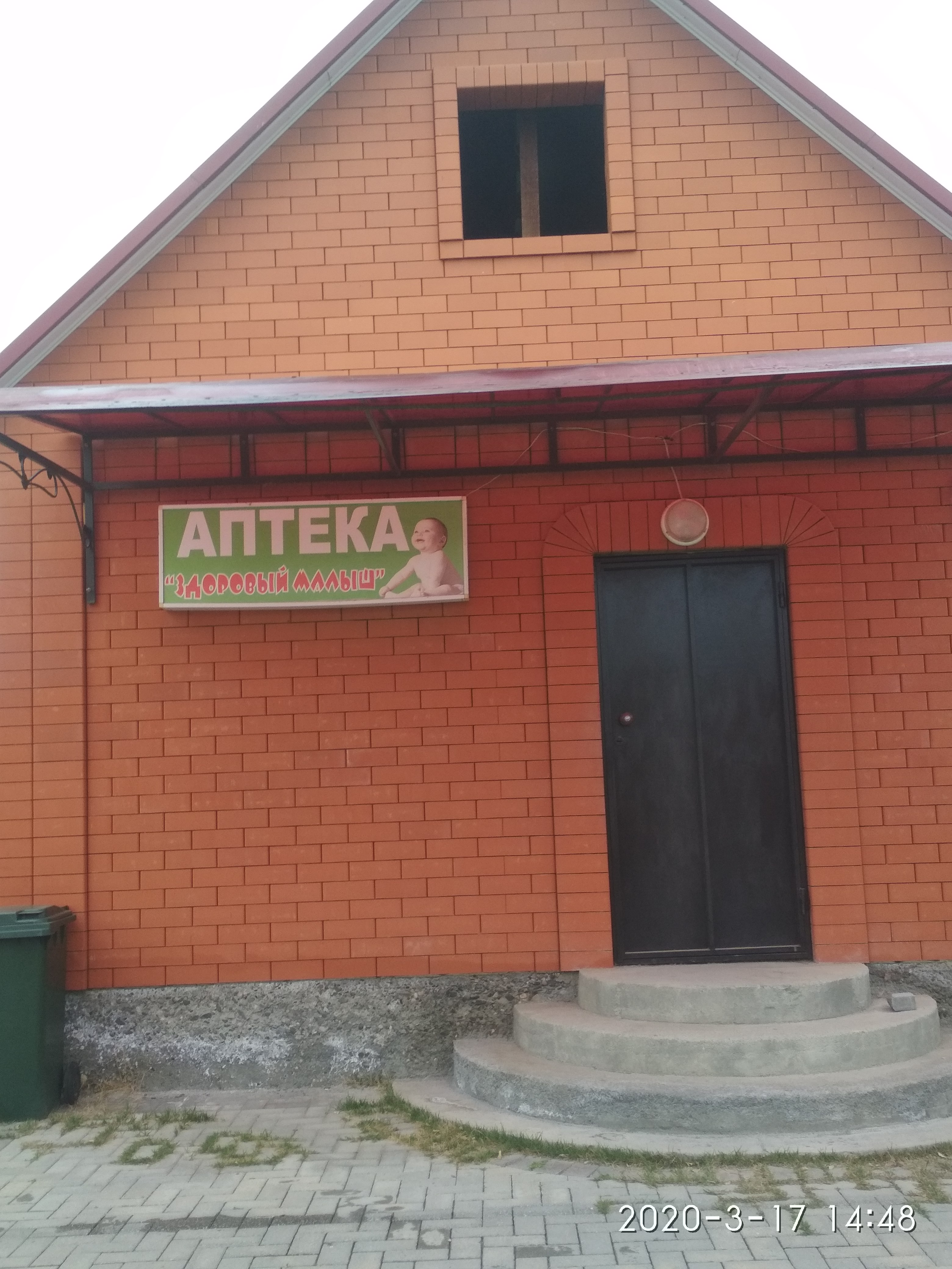 Нохчийн: Керла Шарара аптека